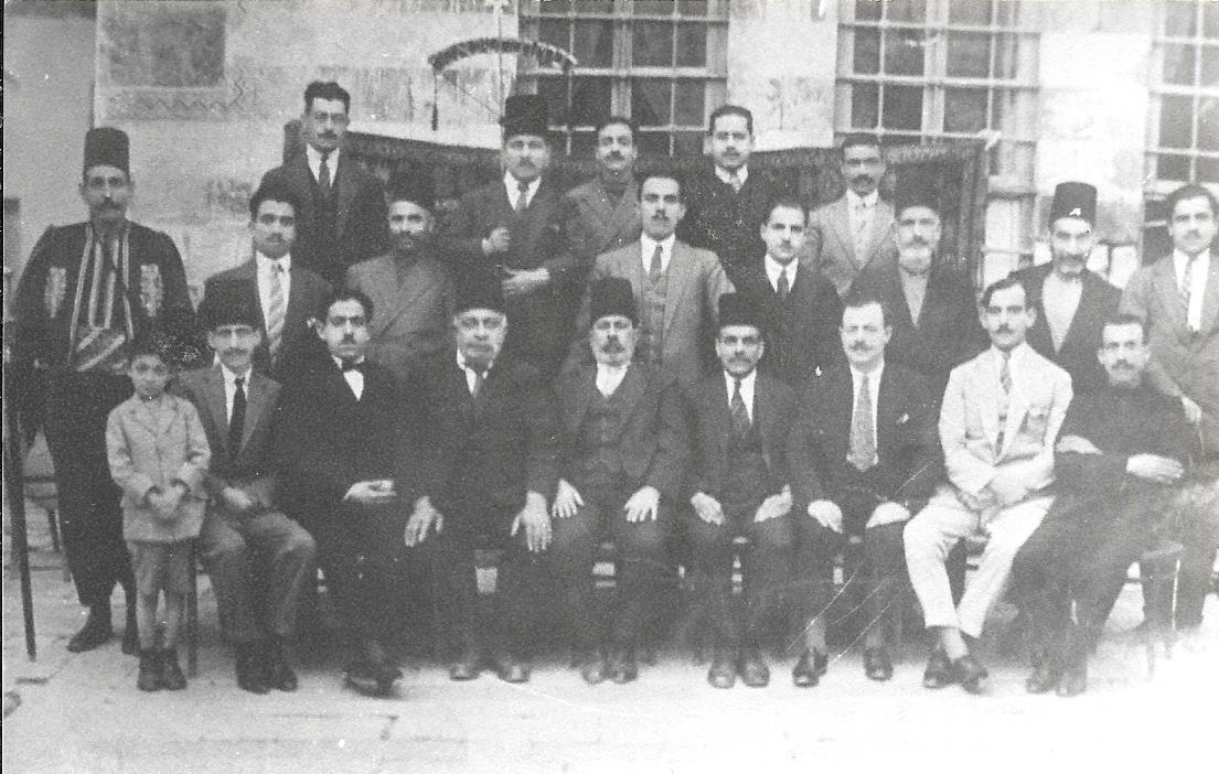 שחאדה ריקה אביו של אליהו עם חברת החסד שהקים בדמשק.